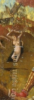 Detail